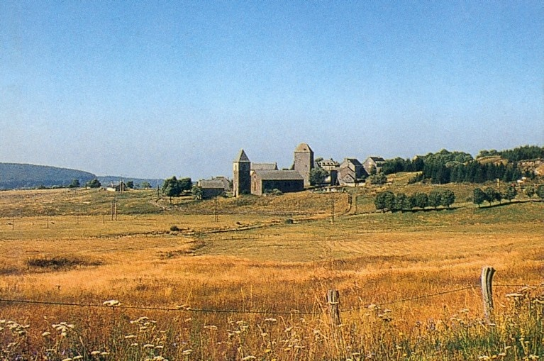 Das Dorf Aubrac mit dem alten Hospital